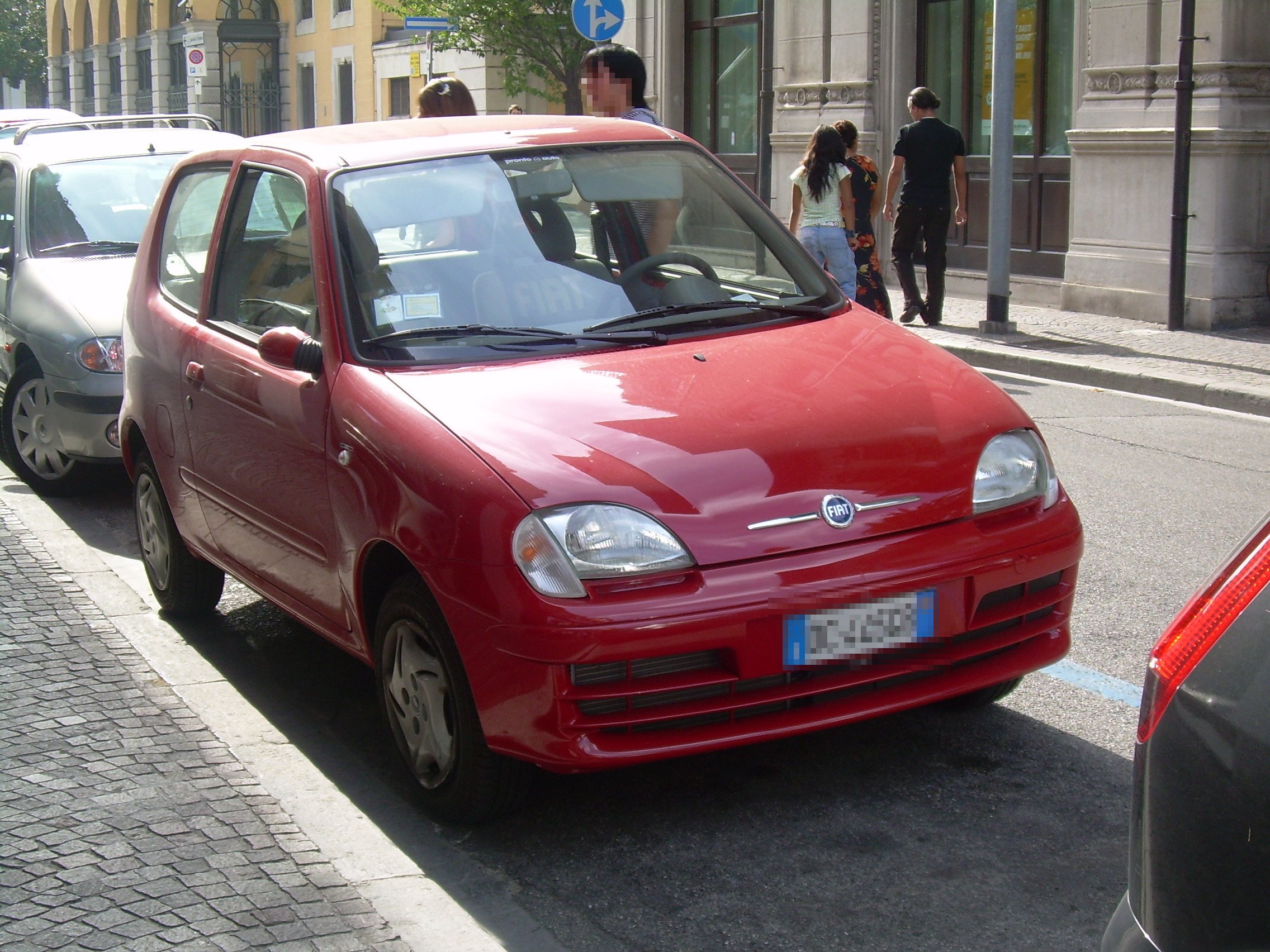 Autore:Powering Licenza: Frontale di una 600 con i baffi cromati.